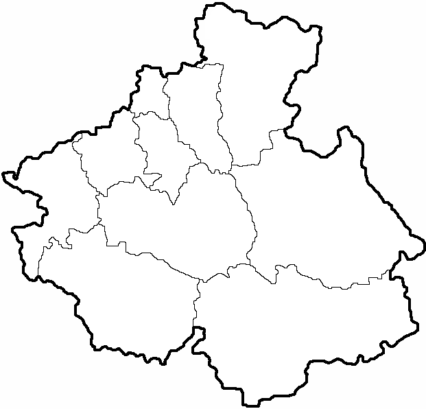 Карта Республики Алтай